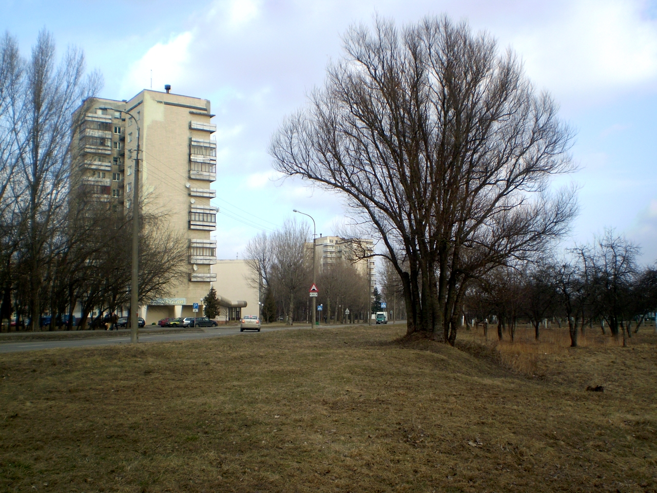 Дрэва на вул. Шаўчэнкі